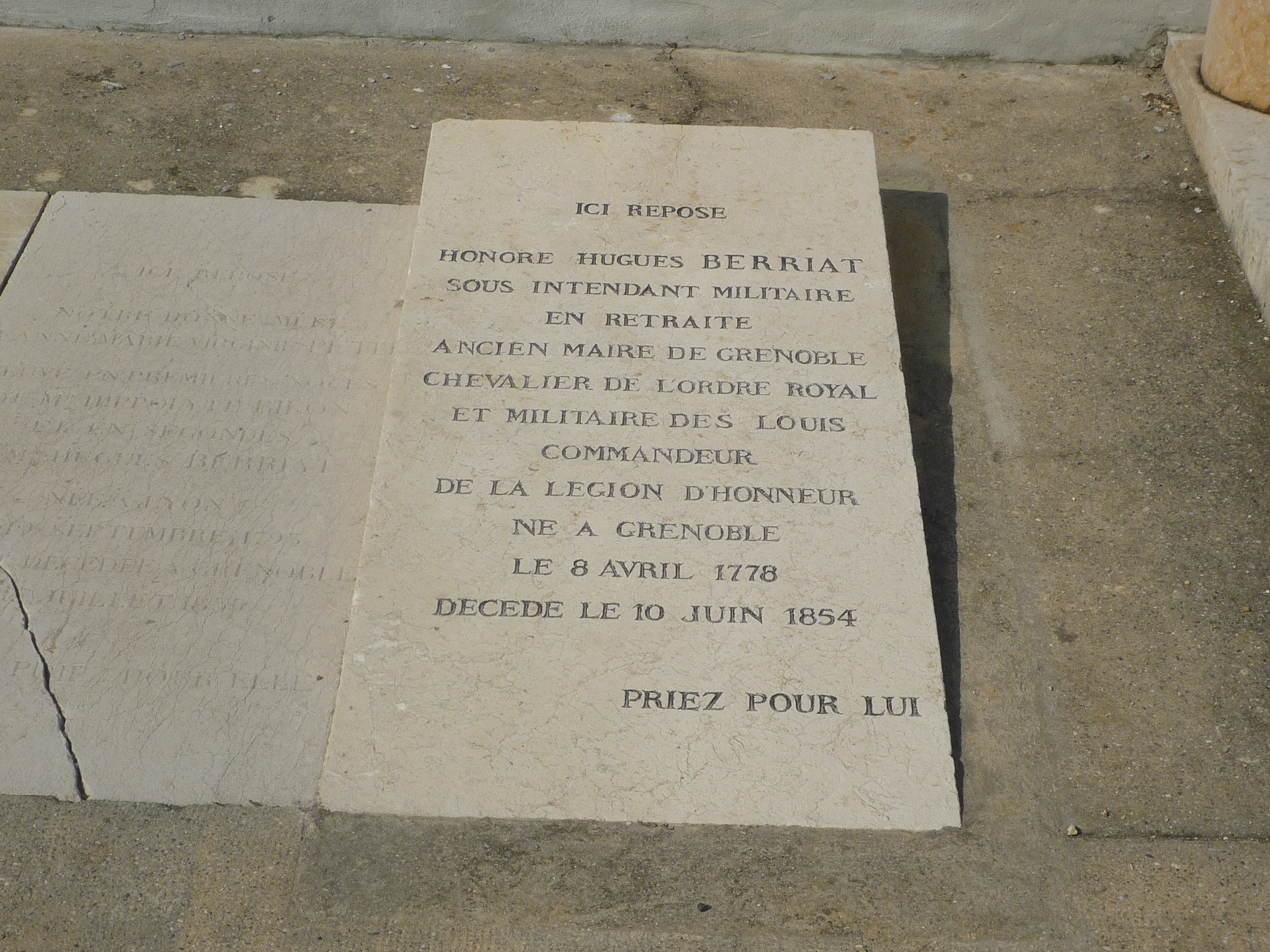 Tombe d'Honoré-Hugues Berriat, maire de Grenoble, cimetière Saint-Roch de Grenoble.